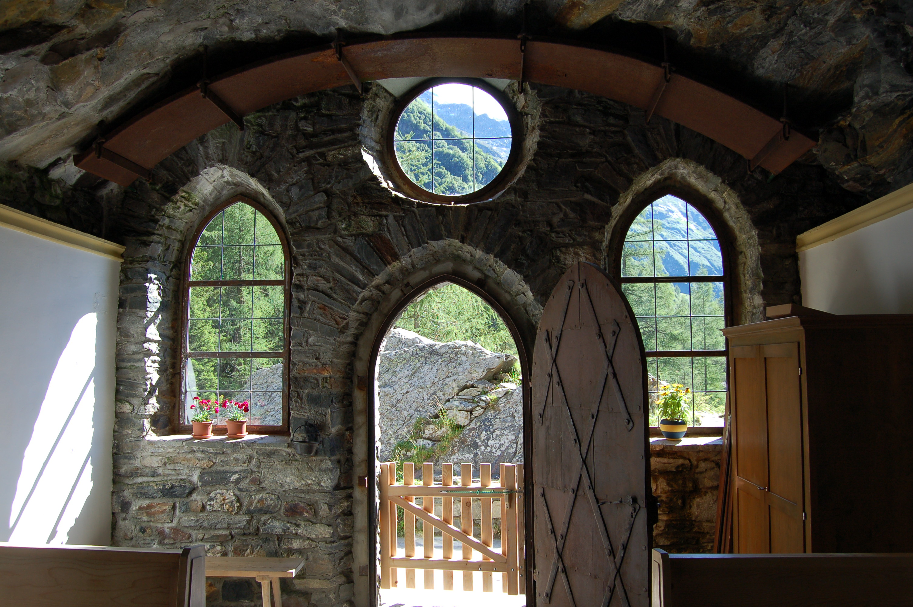 Die denkmalgeschützte Felsenkapelle im Gschlößtal (Gemeinde Matrei in Osttirol)